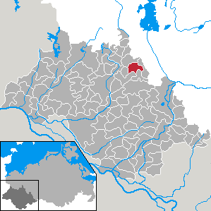 Sülstorf in Mecklenburg-Vorpommern - district Ludwigslust